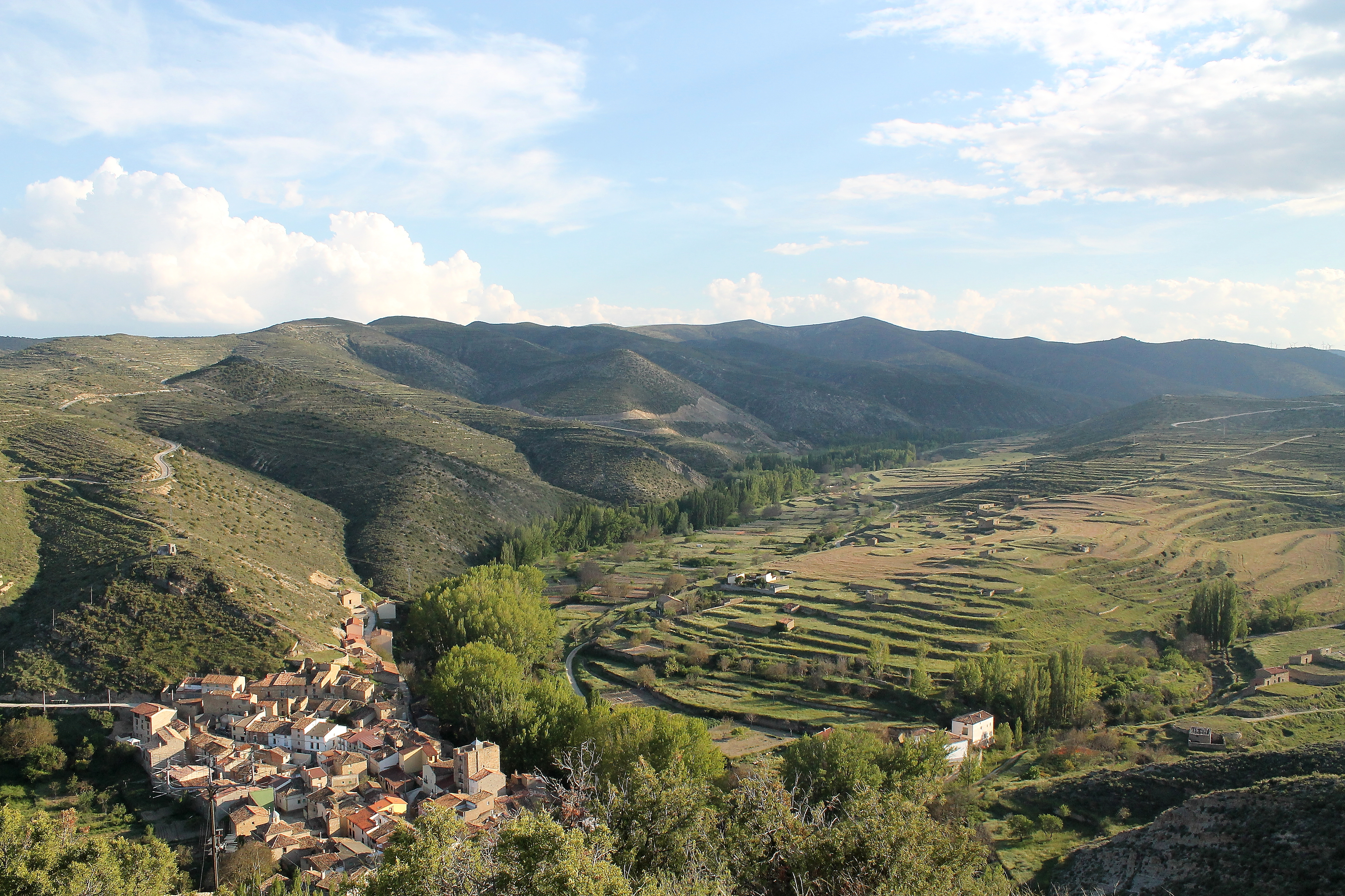 Cigudosa-San Felices This is a photography of a Special Area of Conservation in Spain with the ID: ES4170055. Natura2000 entry, EEA entry